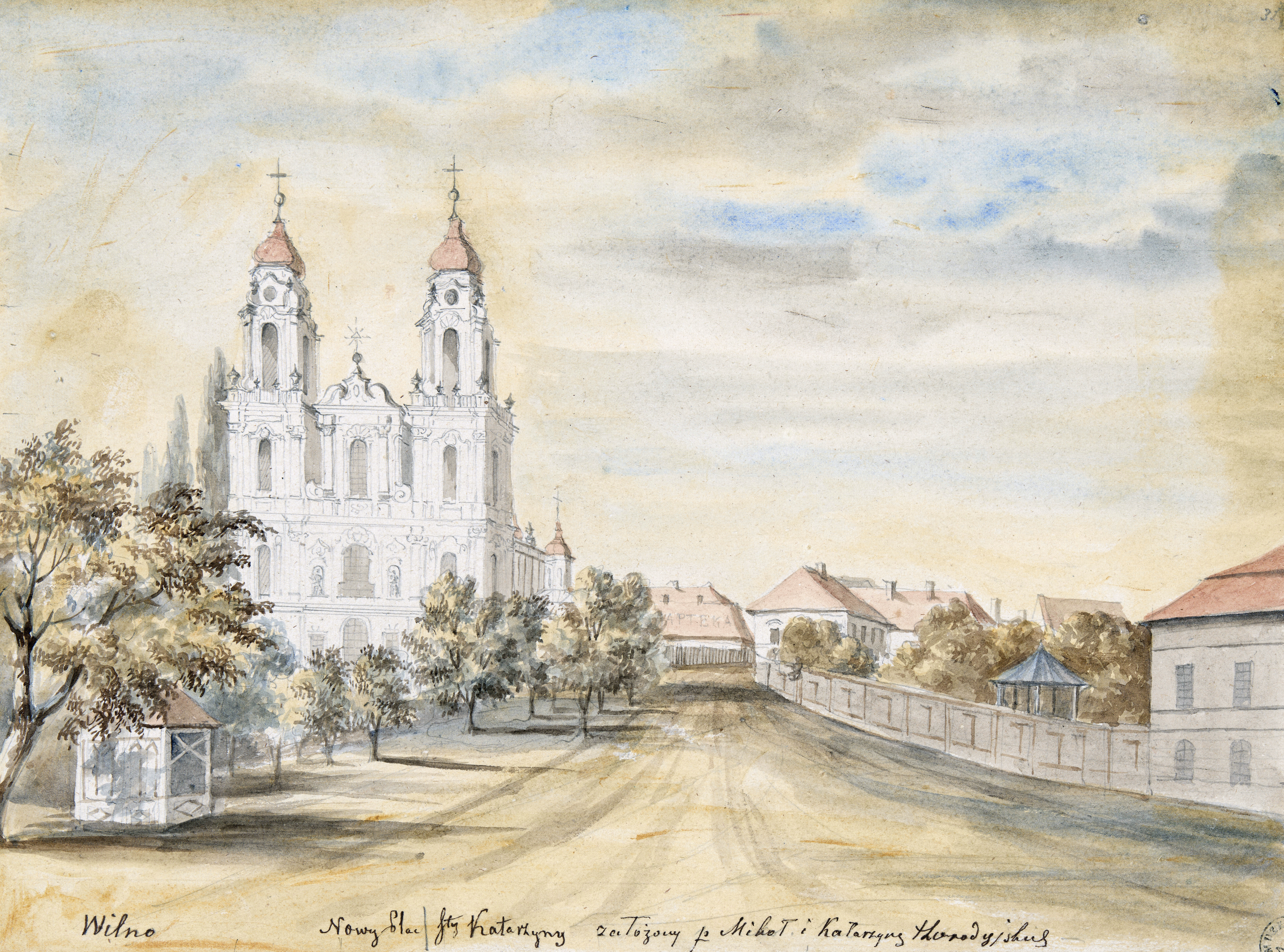 Беларуская (тарашкевіца): Вільня (Vilnia), вуліца Віленская (vulica Vilenskaja). Касьцёл Сьвятой Кацярыны і кляштар бэнэдыктынак